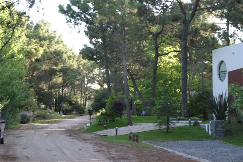 carilo bosque